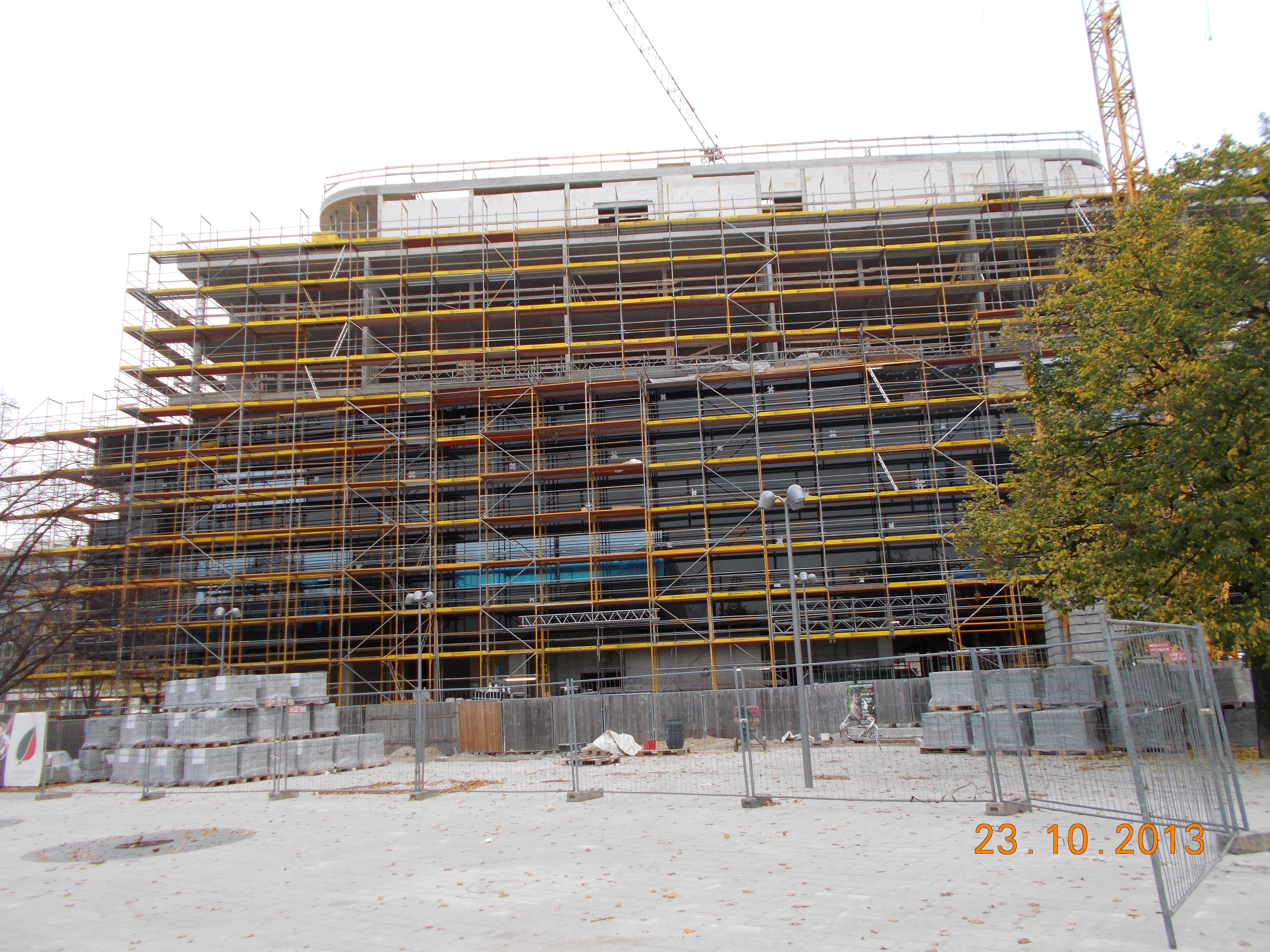 Baustelle Alea 101